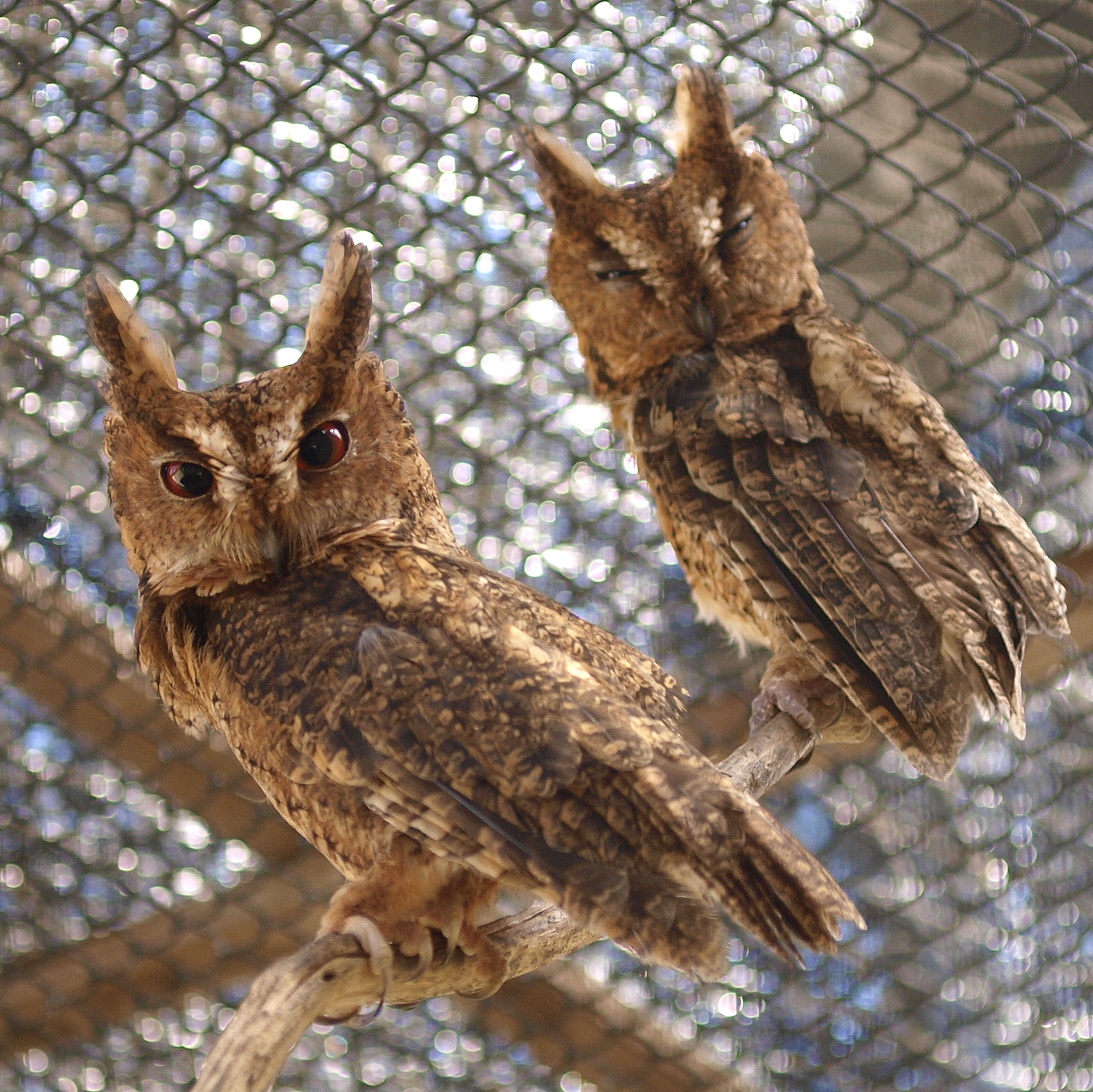 オオコノハズク Collared Scops Owl Domain: Eukaryota • Regnum: Animalia • Phylum: Chordata • Subphylum: Vertebrata • Infraphylum: Gnathostomata • Superclassis: Tetrapoda • Classis: Aves • Ordo: Strigiformes • Familia: Strigidae • Genus: Otus Wikispecies has an entry on: Otus lempiji. Species Otus lempiji (Horsfield, 1821) 動物界 脊索動物門 鳥綱 フクロウ目 フクロウ科 Otus属 Location: Neo Park Okinawa, Japan Other photos: NCBI Taxonomy ID:126860 EOL link: Otus lempiji uBio search link: Otus lempiji